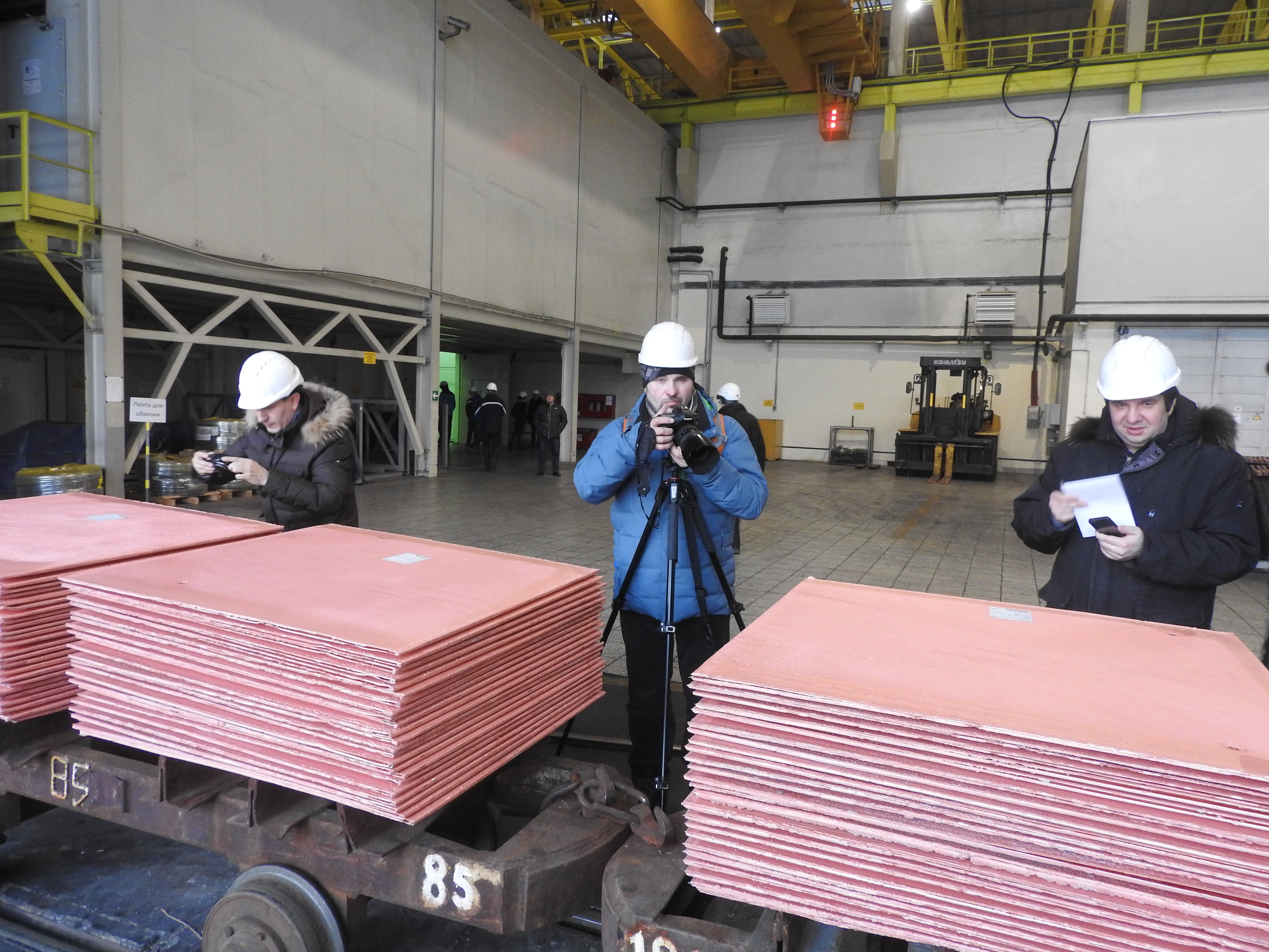 Катоды - это продукция цеха электролиза и сырье для для дальнейшего производства